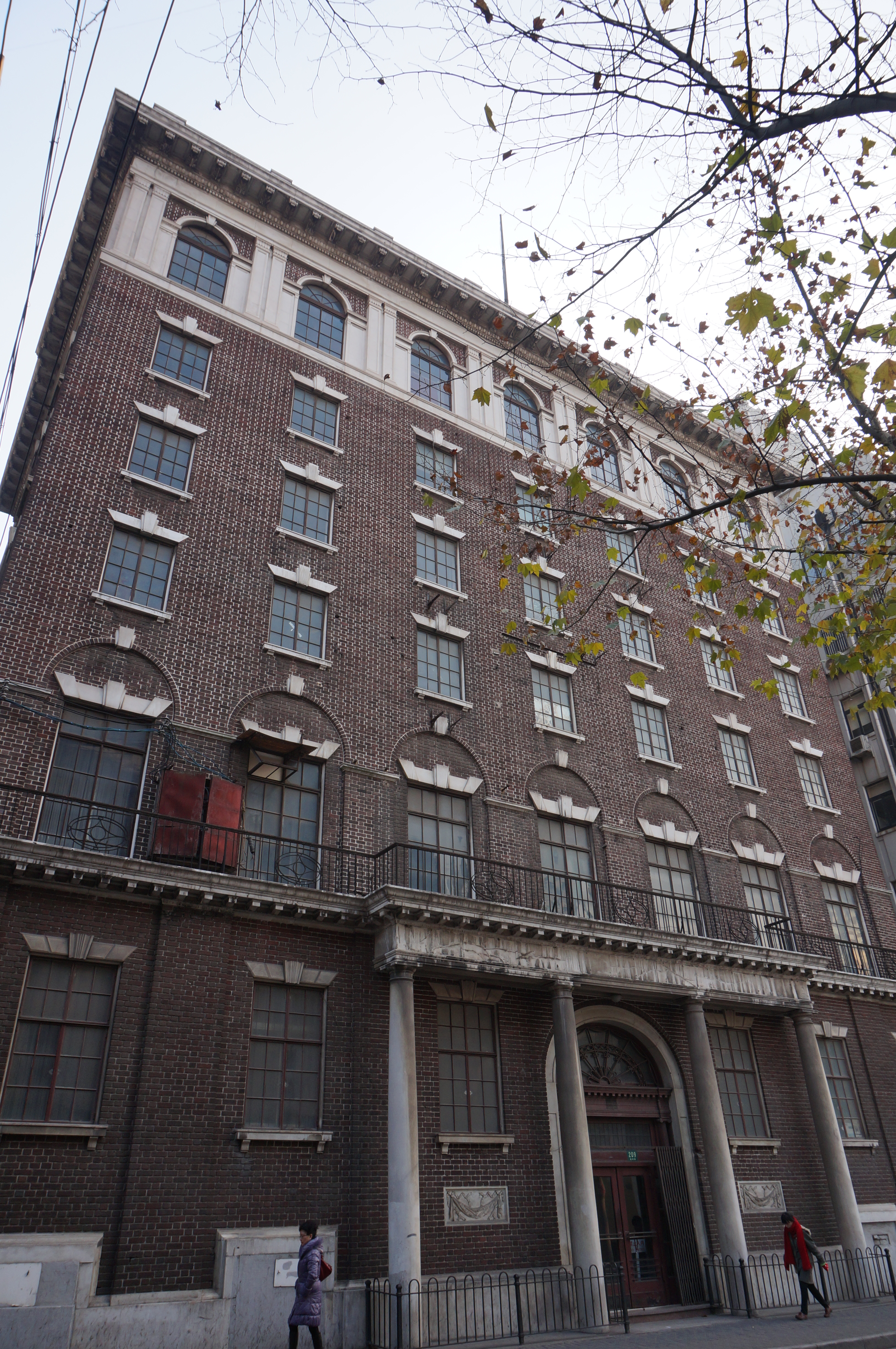 原美国花旗总会 福州路209号